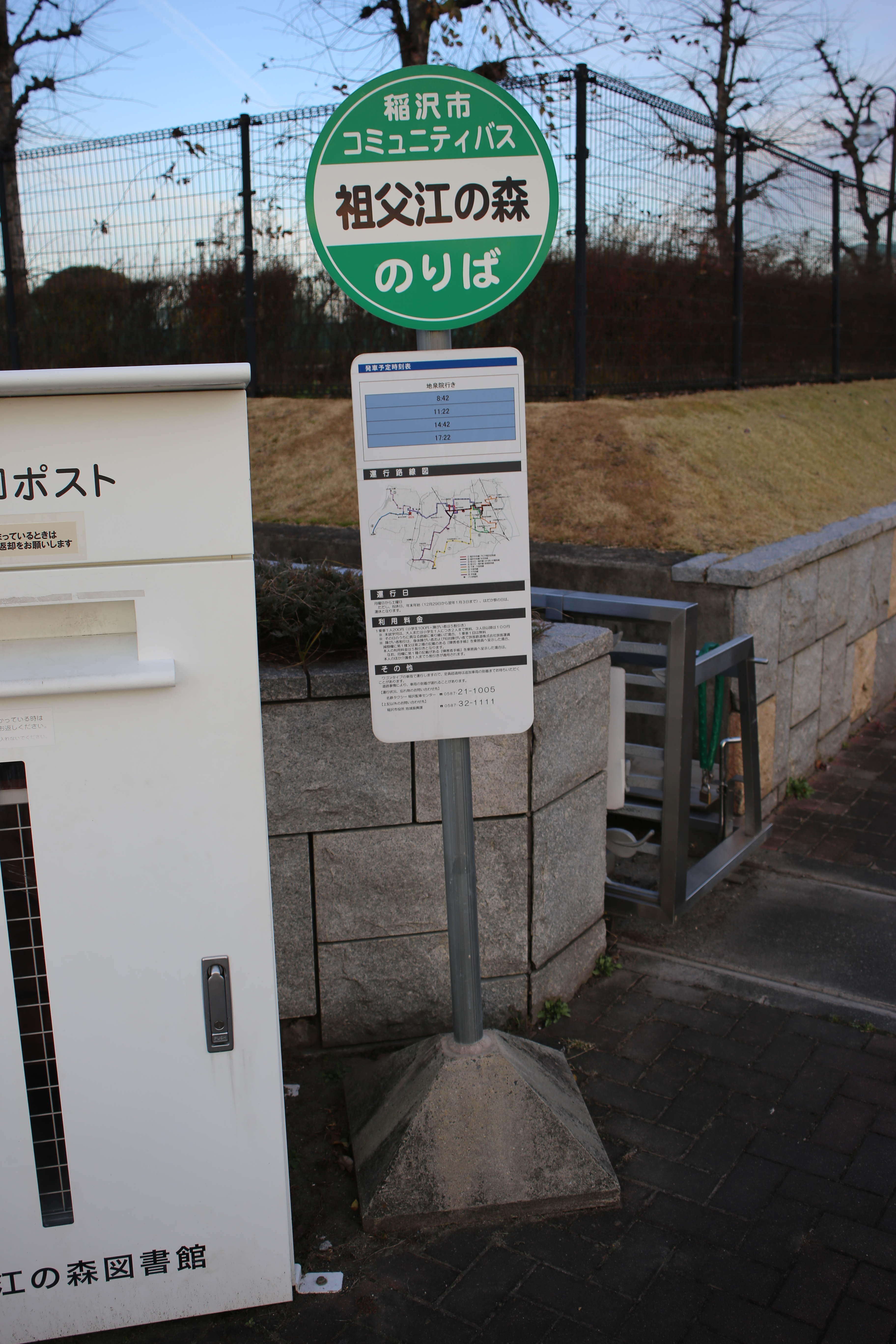 愛知県稲沢市の稲沢市コミュニティバス祖父江の森停留所